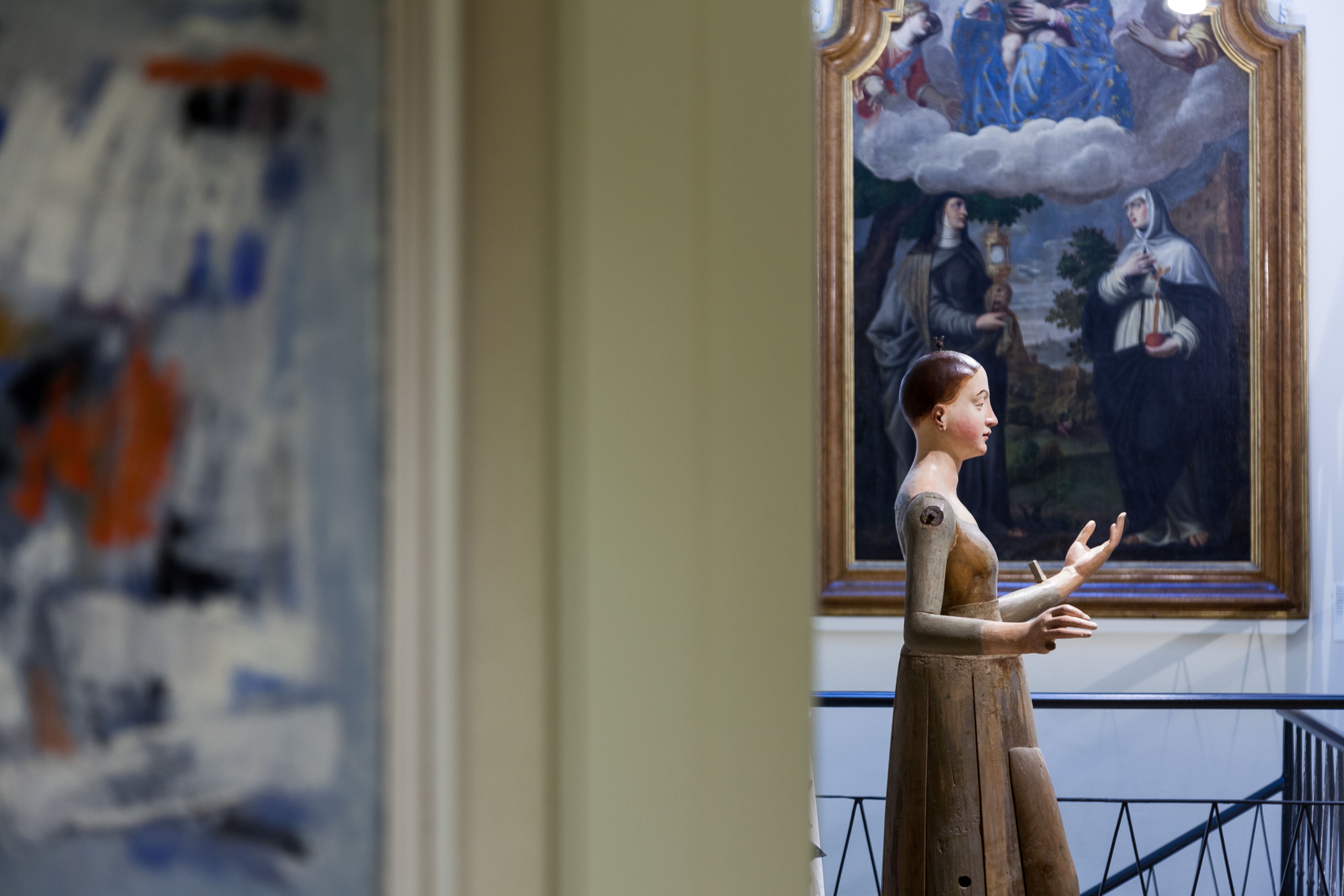 Mast Castel Goffredo-ingresso